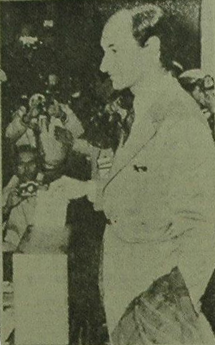 Fernando de la Rúa, entonces candidato de la Unión Cívica Radical a Senador de la Nación Argentina por Capital Federal, votando en los comicios en los que resultó electo, 15 de abril de 1973.